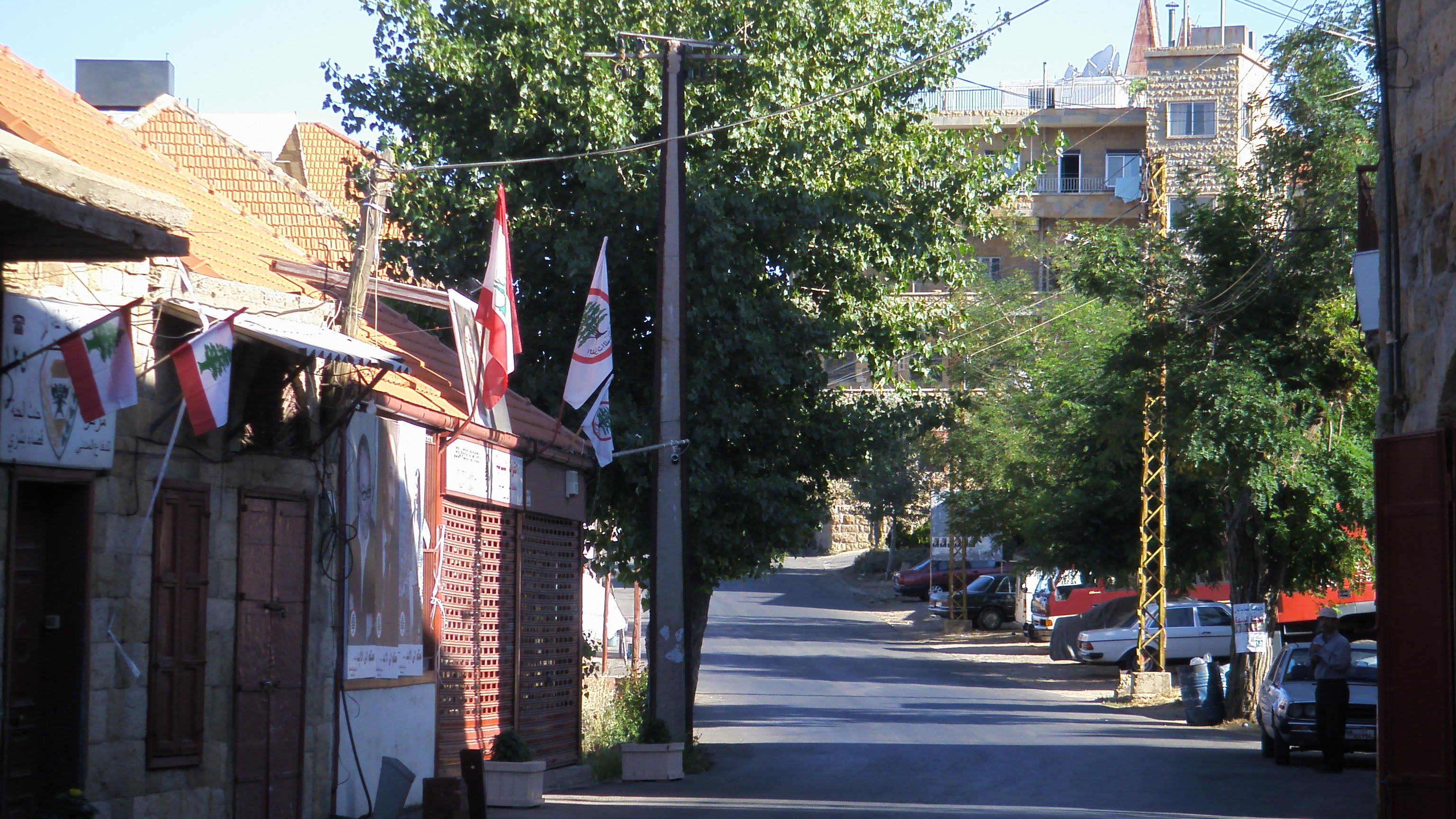 La route au centre d'Hadath El Jebbeh (Liban-Nord)